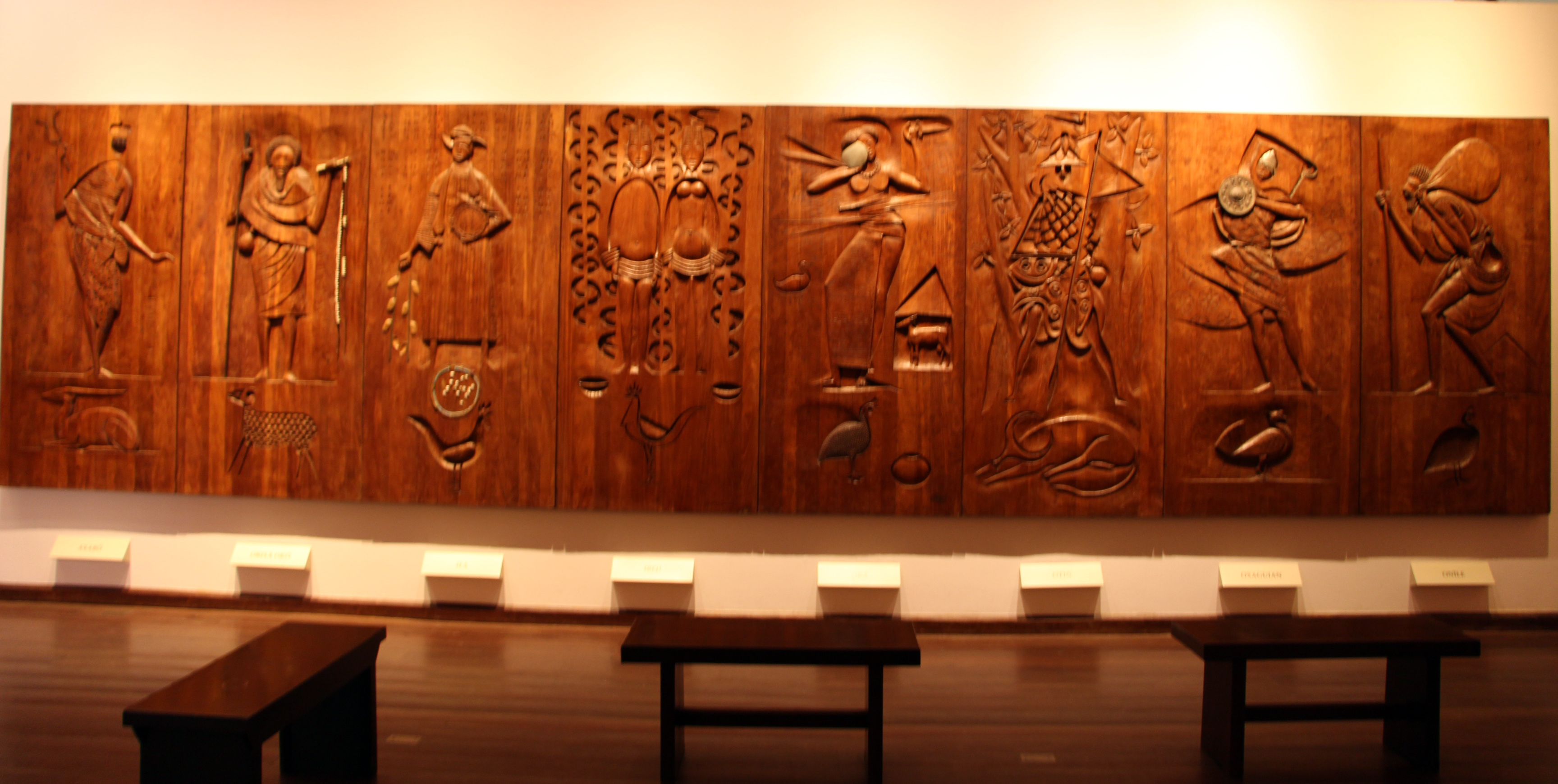 Candomblé nel Museu Afro-Brasileiro, Salvador